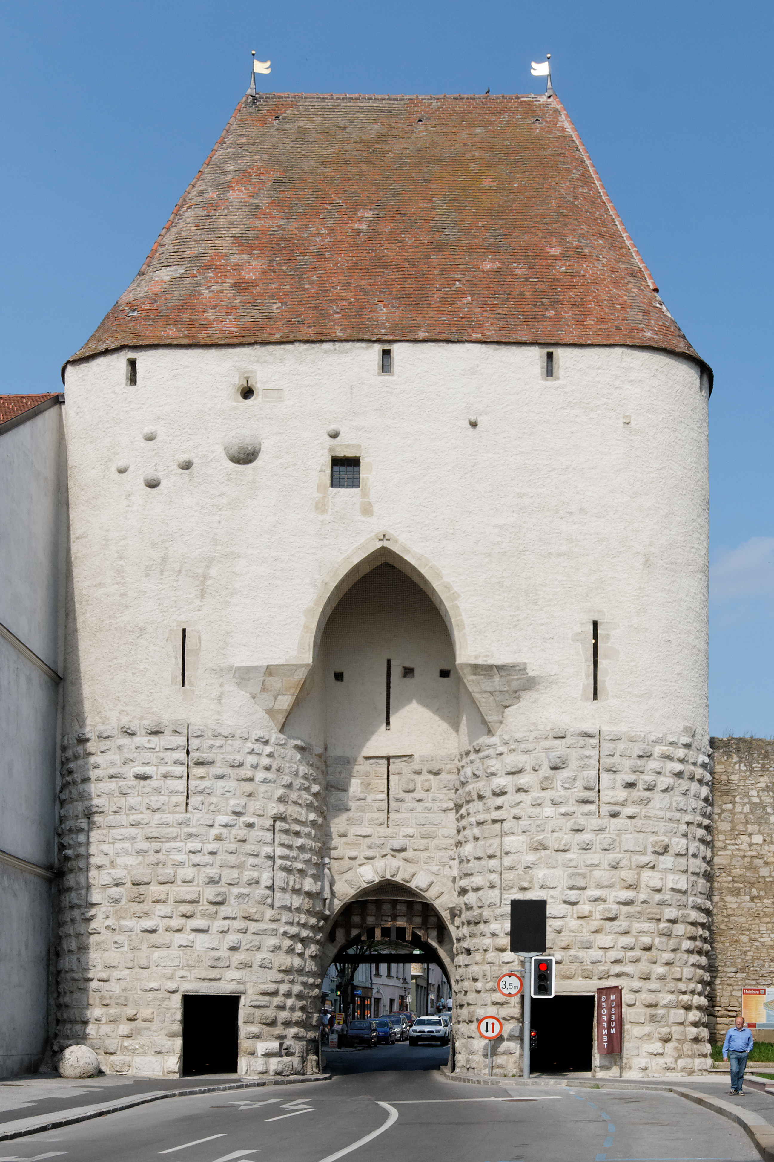 Wienertor in Hainburg (Donau) aus dem 13. Jahrhundert, größtes mittelalterliches Stadttor Europas.